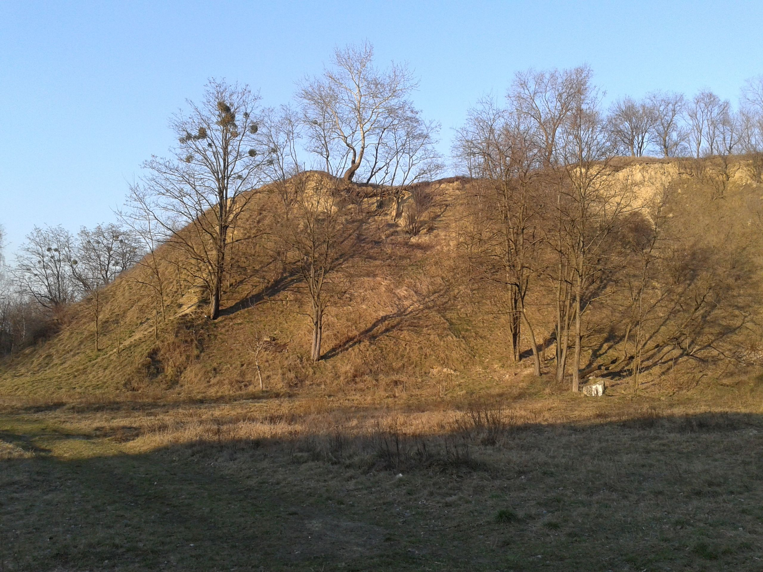 Львів, парк Знесіння (Кайзервальд)